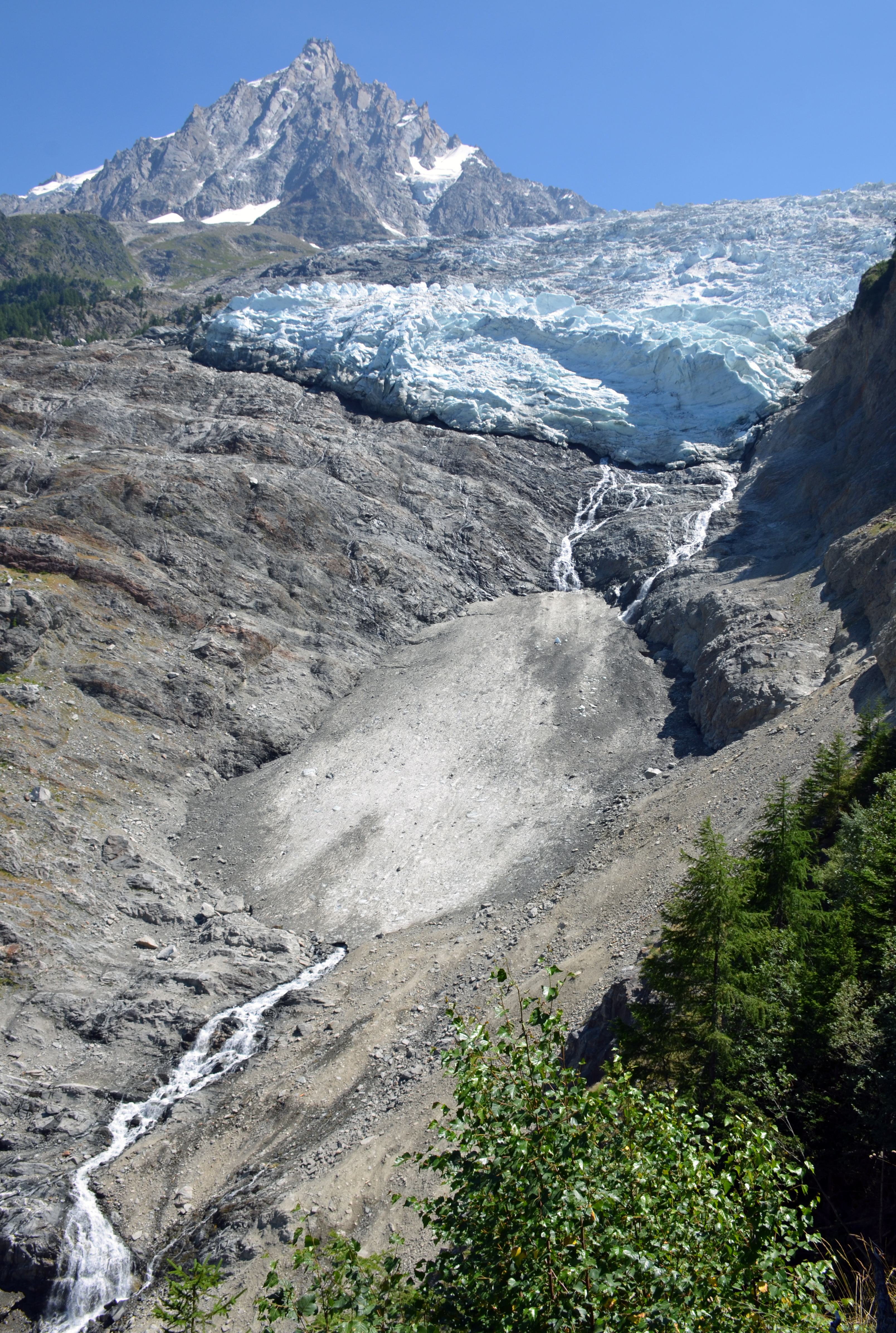 Le Glacier des Bossons, photo prise le 14 Juillet 2015.